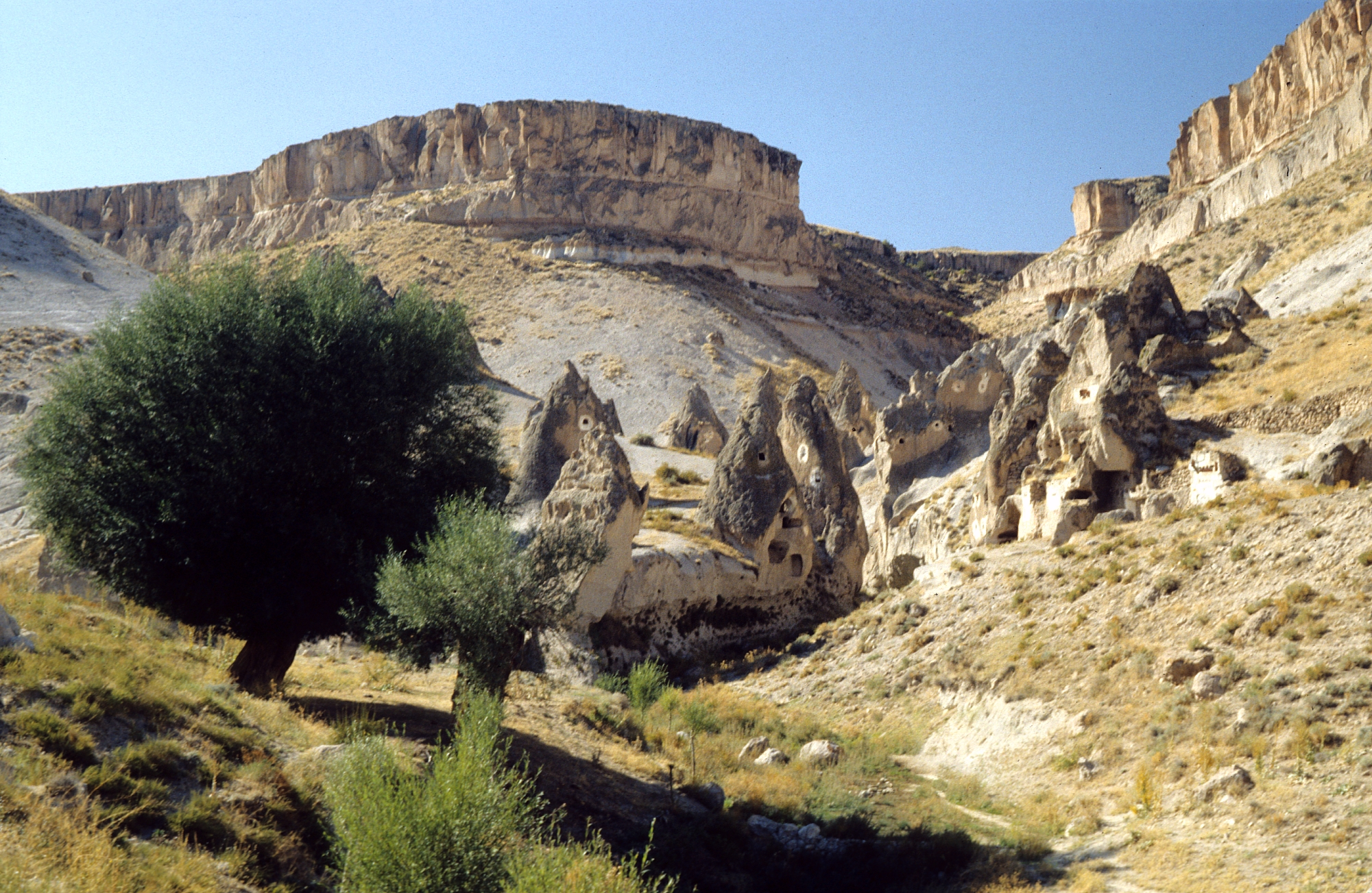 Nordteil des Soğanlı-Tals mit Taubenhäusern, Kappadokien, Zentraltürkei